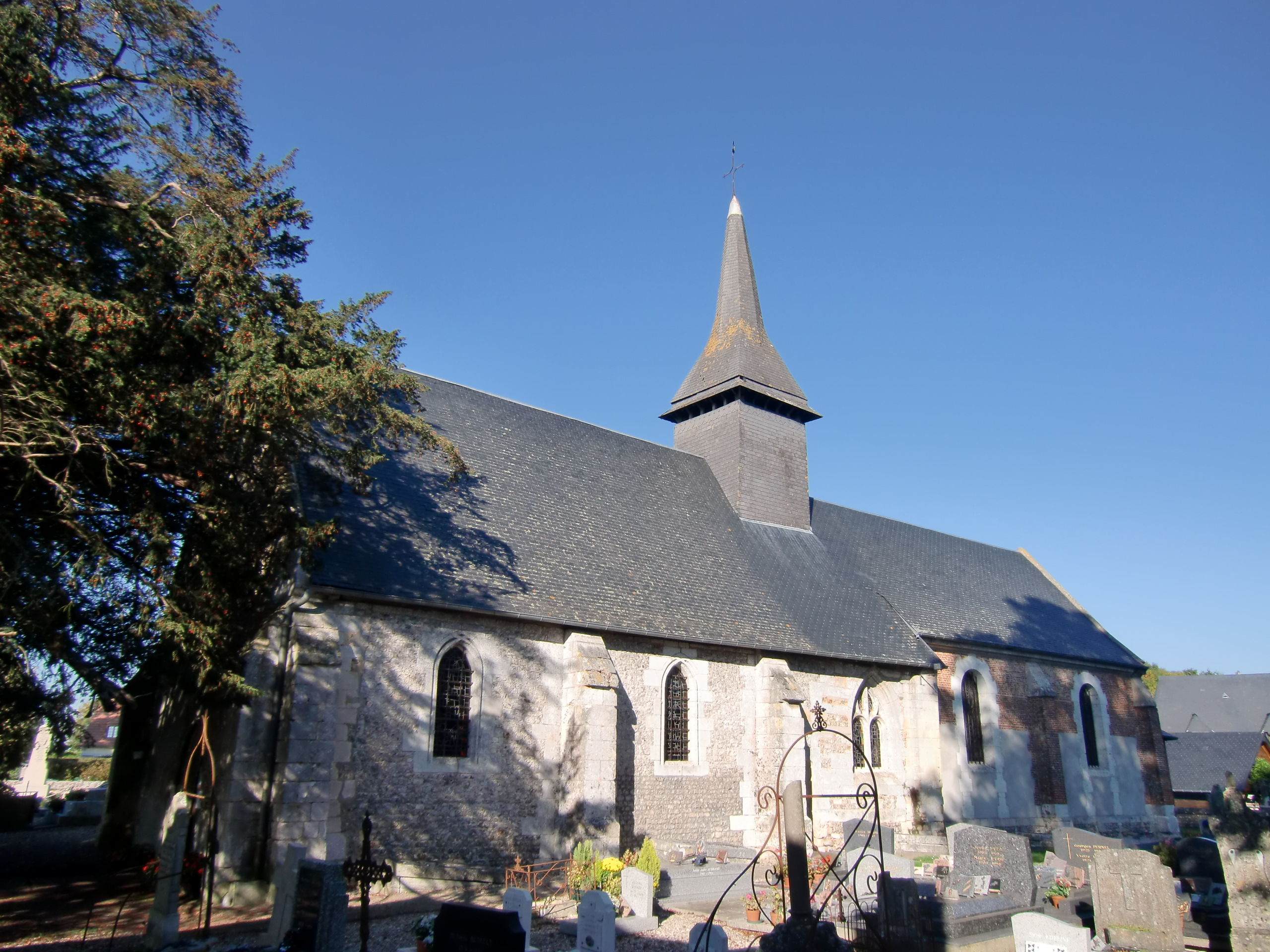 église de Saint-Ouen-des-Champs (Eure, Normandie, France)